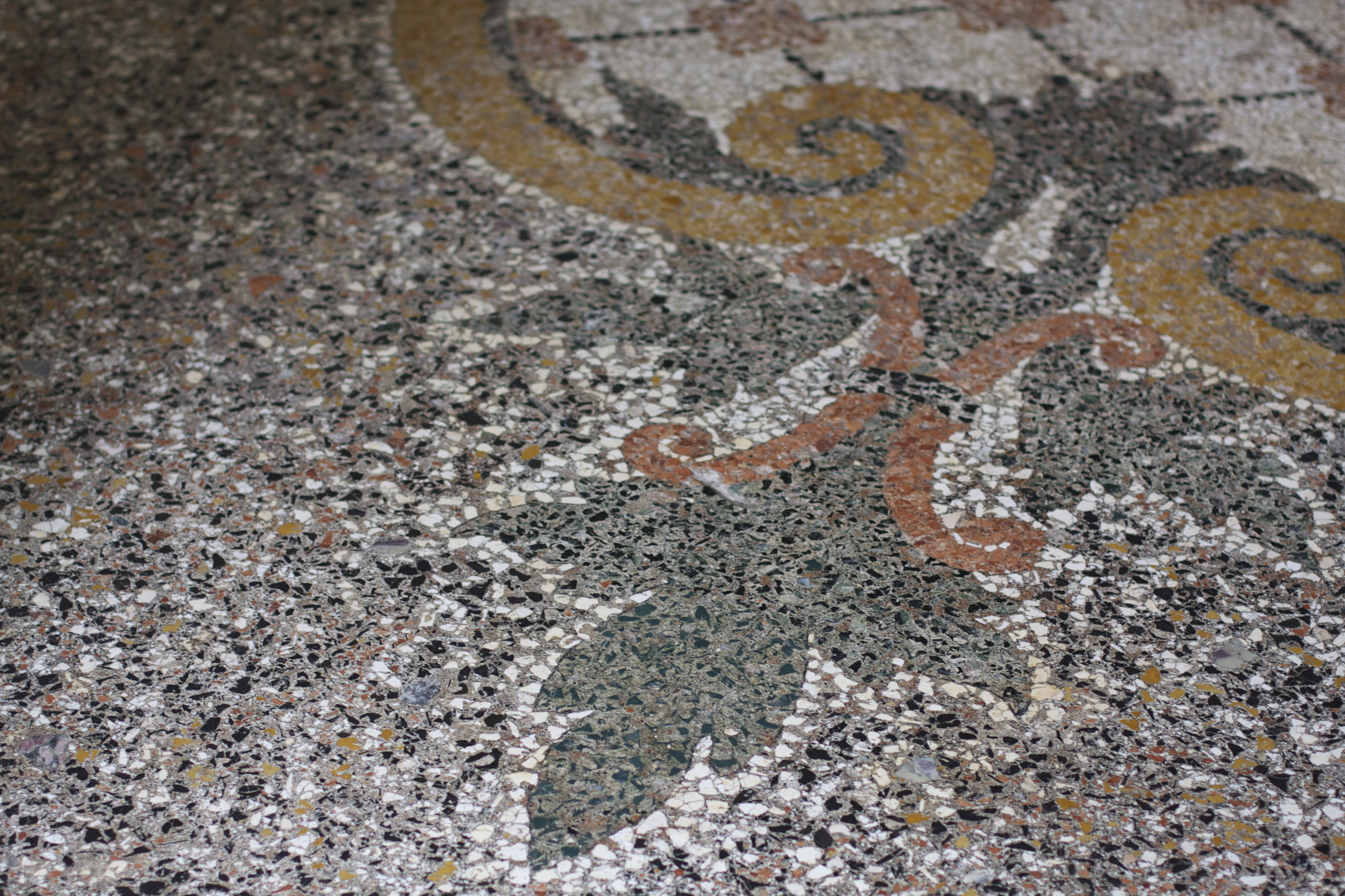 Mosaico decorativo della pavimentazione nel Salone Veneziano di Villa Cigolotti.